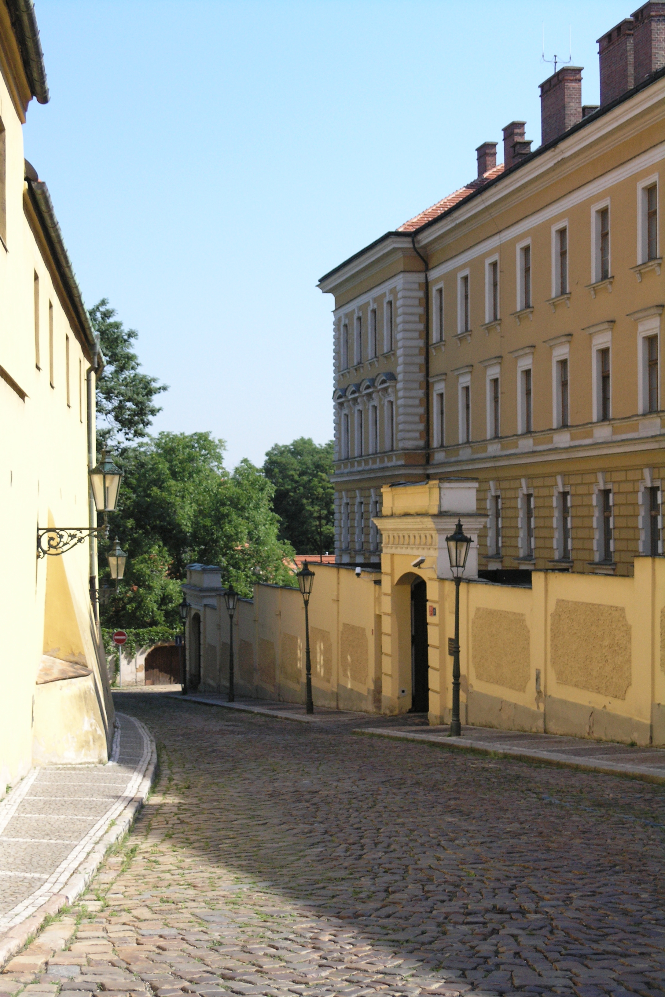 Praha, Hradčany - ulice Kapucínská